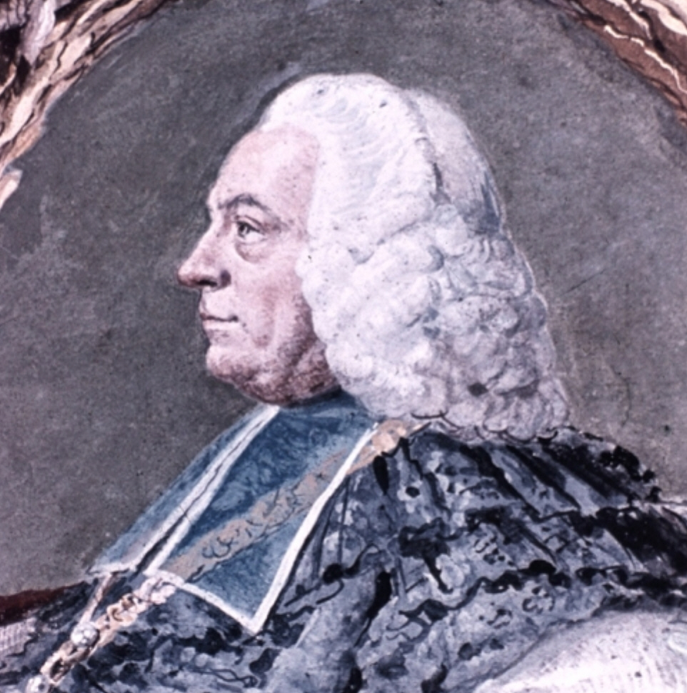 Karl Philipp von Greiffenclau-Vollraths (1690-1754), Prince-Bishop of Würzburg